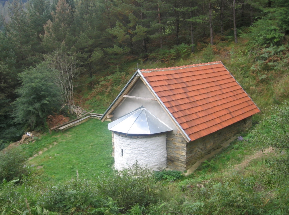 Црква св. Арханђела у Колуници.